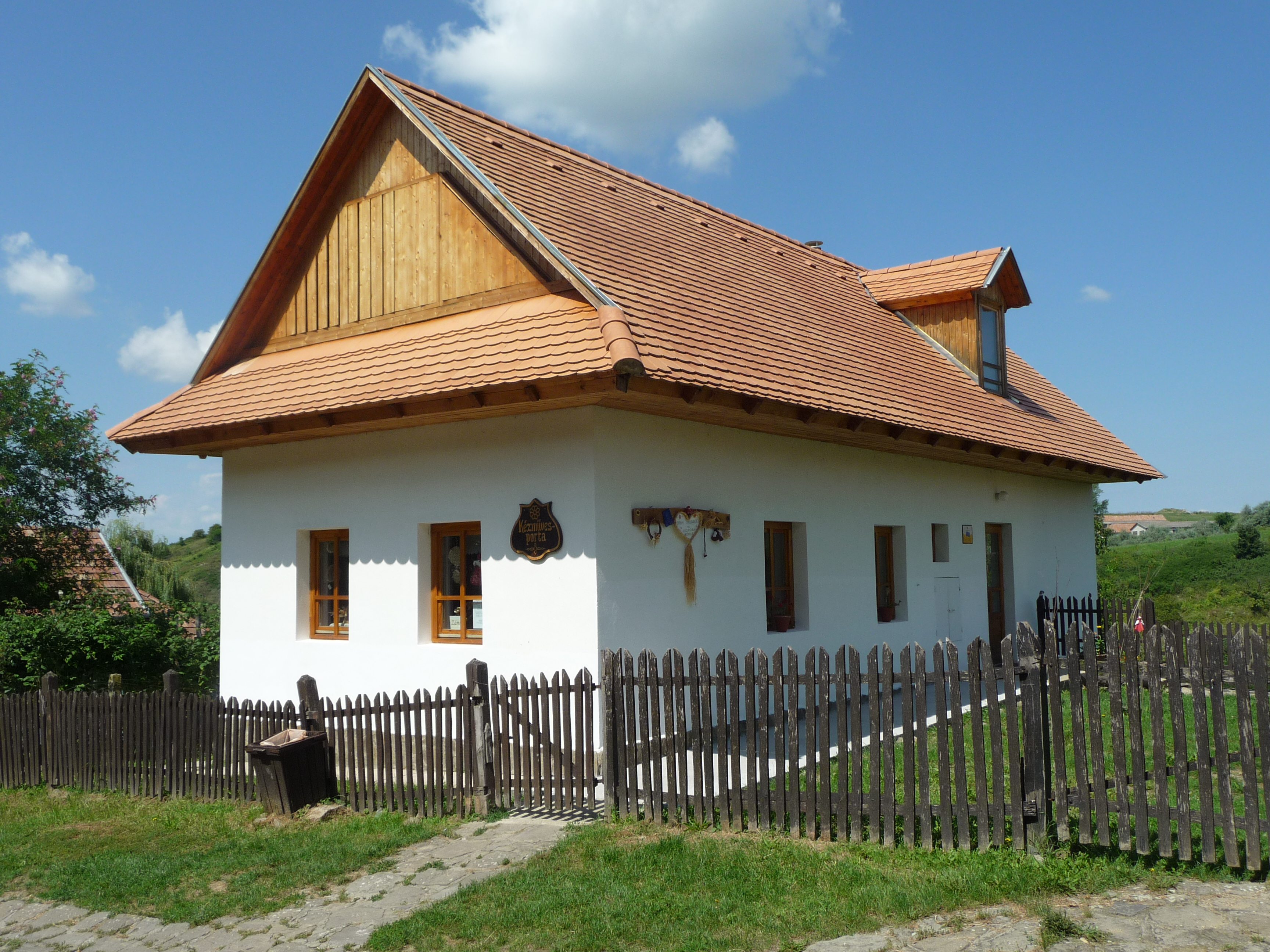 Hollókő, Kossuth L. út 53.